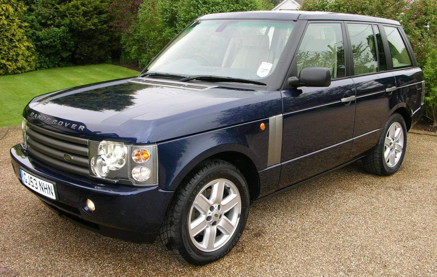 Range Rover V8 Vogue